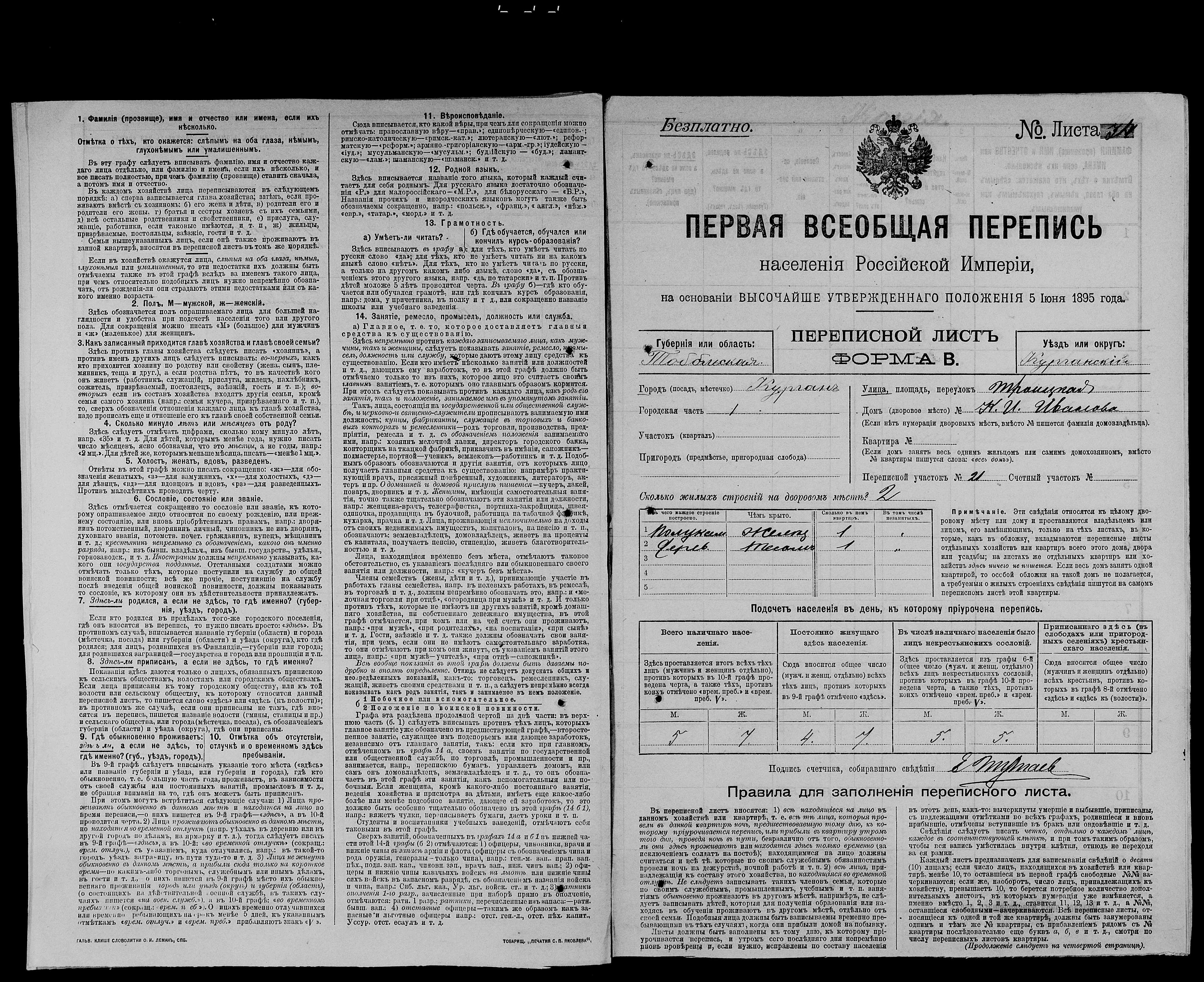 Перепись 1897, Тобольская губерния, г. Курган, ул. Троицкая, дом Иванова